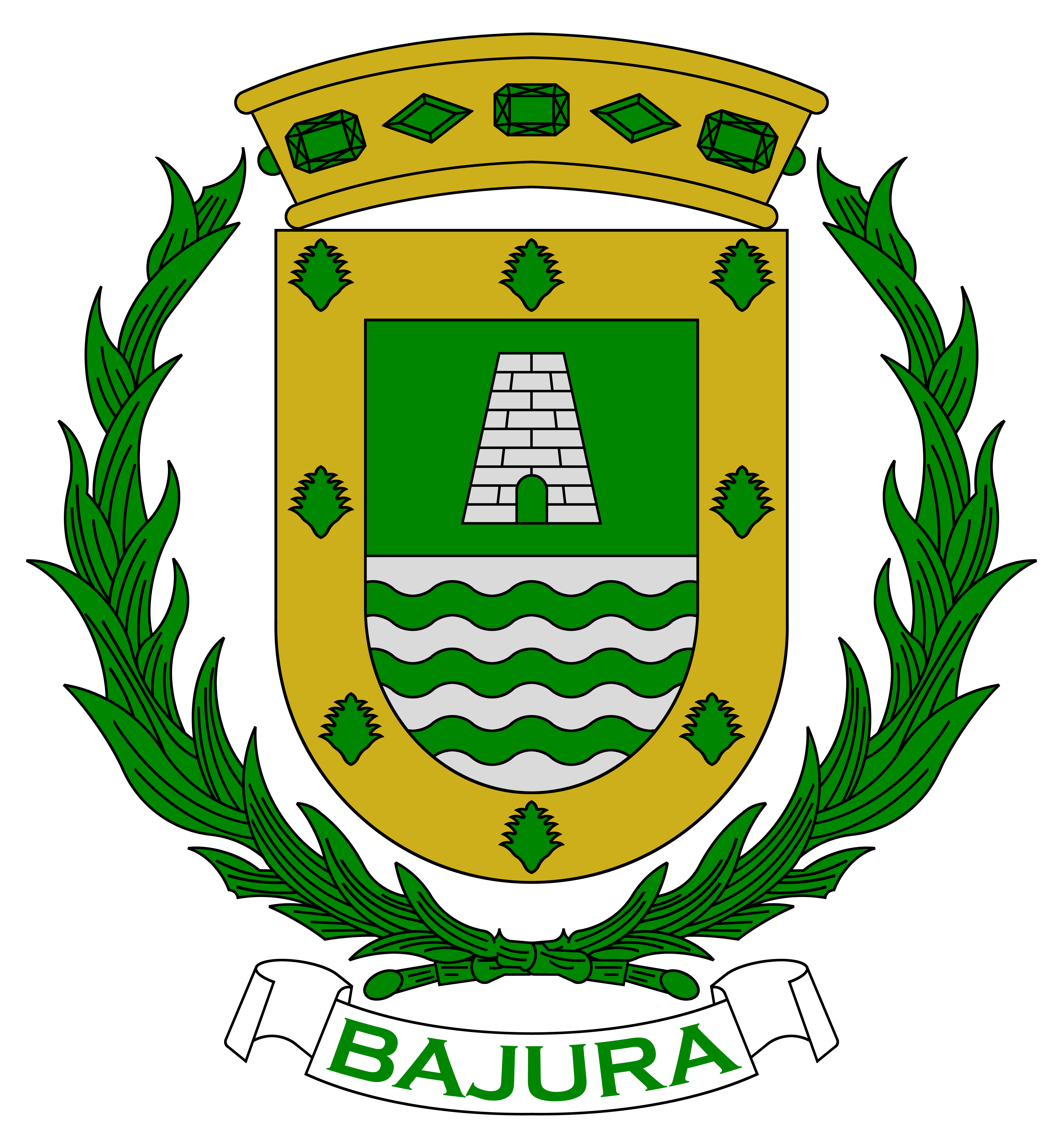 Escudo del Barrio Bajura